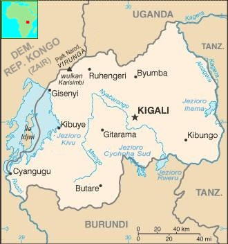 Mapa Rwandy z angielskiej Wikipedii spolszczona